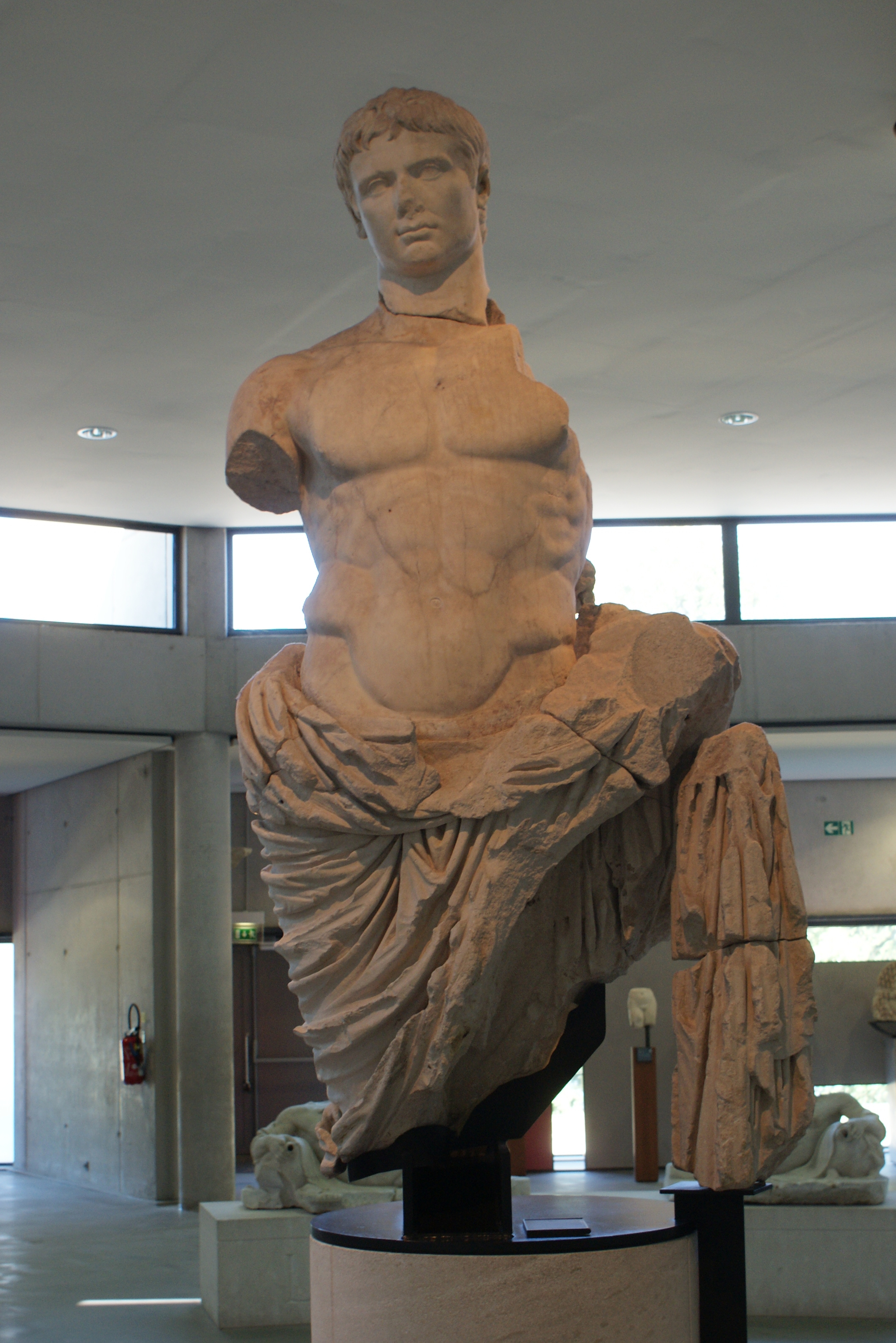 Tronc monumental d'Auguste découvert lors des fouilles du théâtre antique d'Arles. Le torse et la tête sont découverts séparément, respectivement en 1750 et 1834. Proviendrait de la décoration du postscaenium, au dessus de la porte royale. Exposé au Musée de l'Arles Antique. FAN 92.00.215/2679